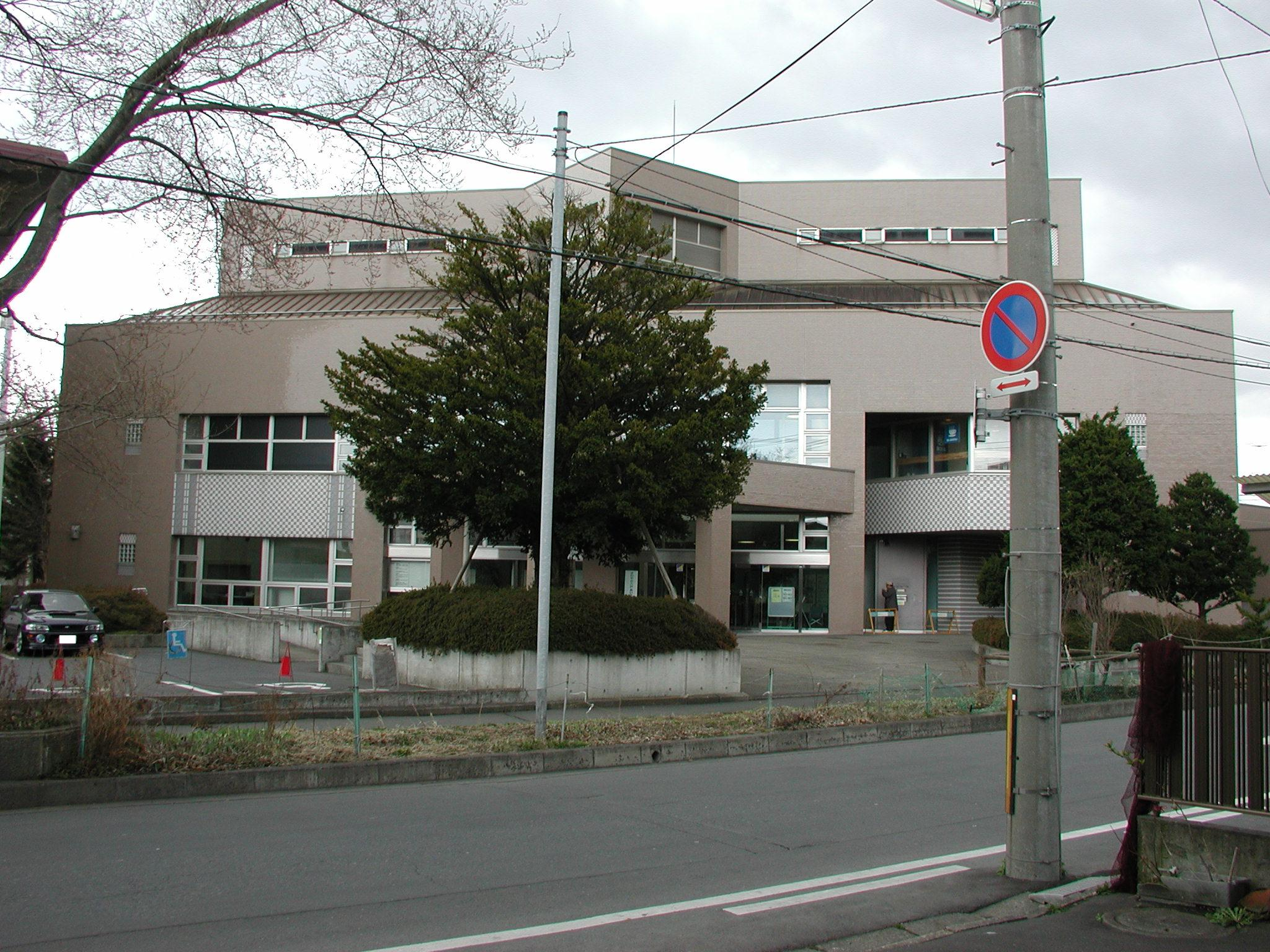 八戸市立図書館 ※：自動車ナンバー部分隠し加工処理済み